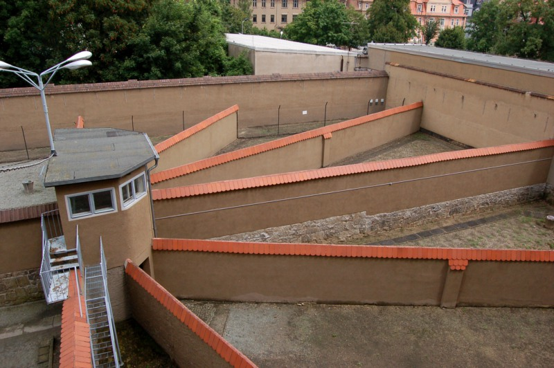 Sicht auf die Einzelfreignaghöfe der isoliert untergebrachten Häftlinge